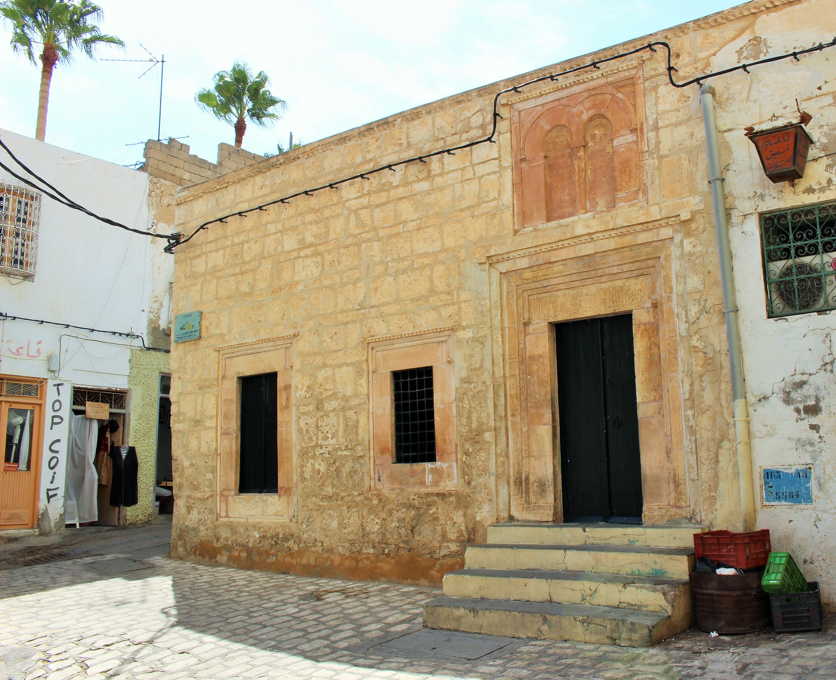 Mosquée Djama-el-Bahri